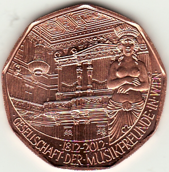 Austrian five-Euro coin